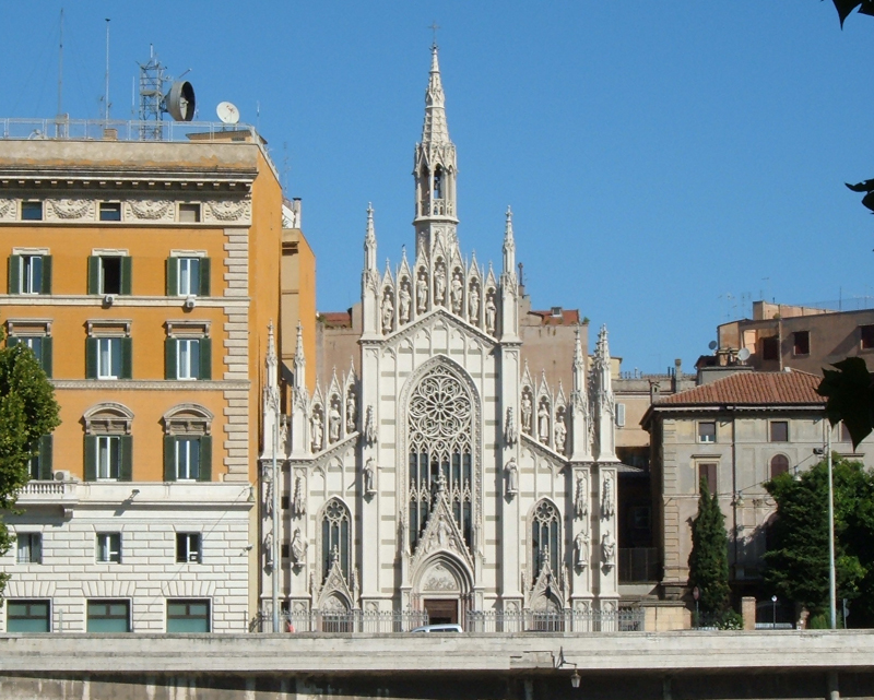 Chiesa del Sacro Cuore del Suffragio, nel rione Prati, a Roma. Foto personale.